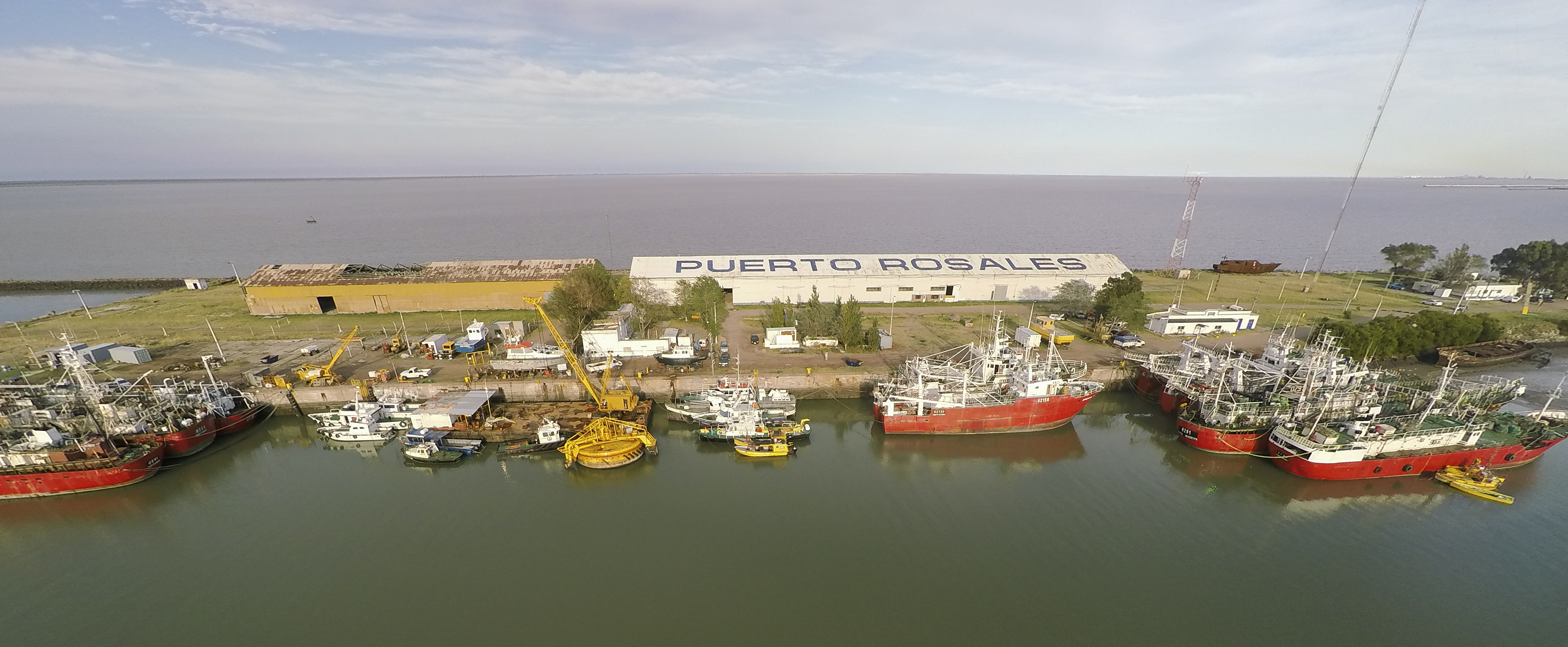 Buques en el muelle de Puerto Rosales (Foto: Maurucio Clermont)